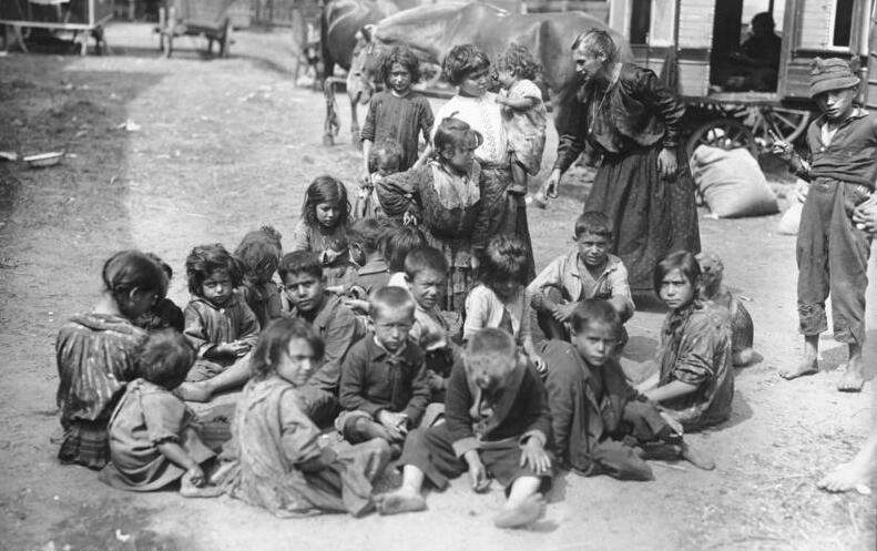 Berlin, Sinti und Roma-Kinder Zigeunerplage in Berlin. Die Zigeuner, die im Sommer als Pferdehändler, Kammerjäger u.s.w. durch das Land ziehen, haben im Norden Berlins ein Winterquartier, in dem sie sich nicht etwa wie dankbare Gäste benehmen, sondern zu einer wahren Plage werden. Die Fälle von Betrug, Diebstahl und Schlimmerem mehren sich derart, dass die Polizei den braunen Vagabunden immer grössere Aufmarksamkeit schenkt. Erfreulicher Nachwuchs. 1926